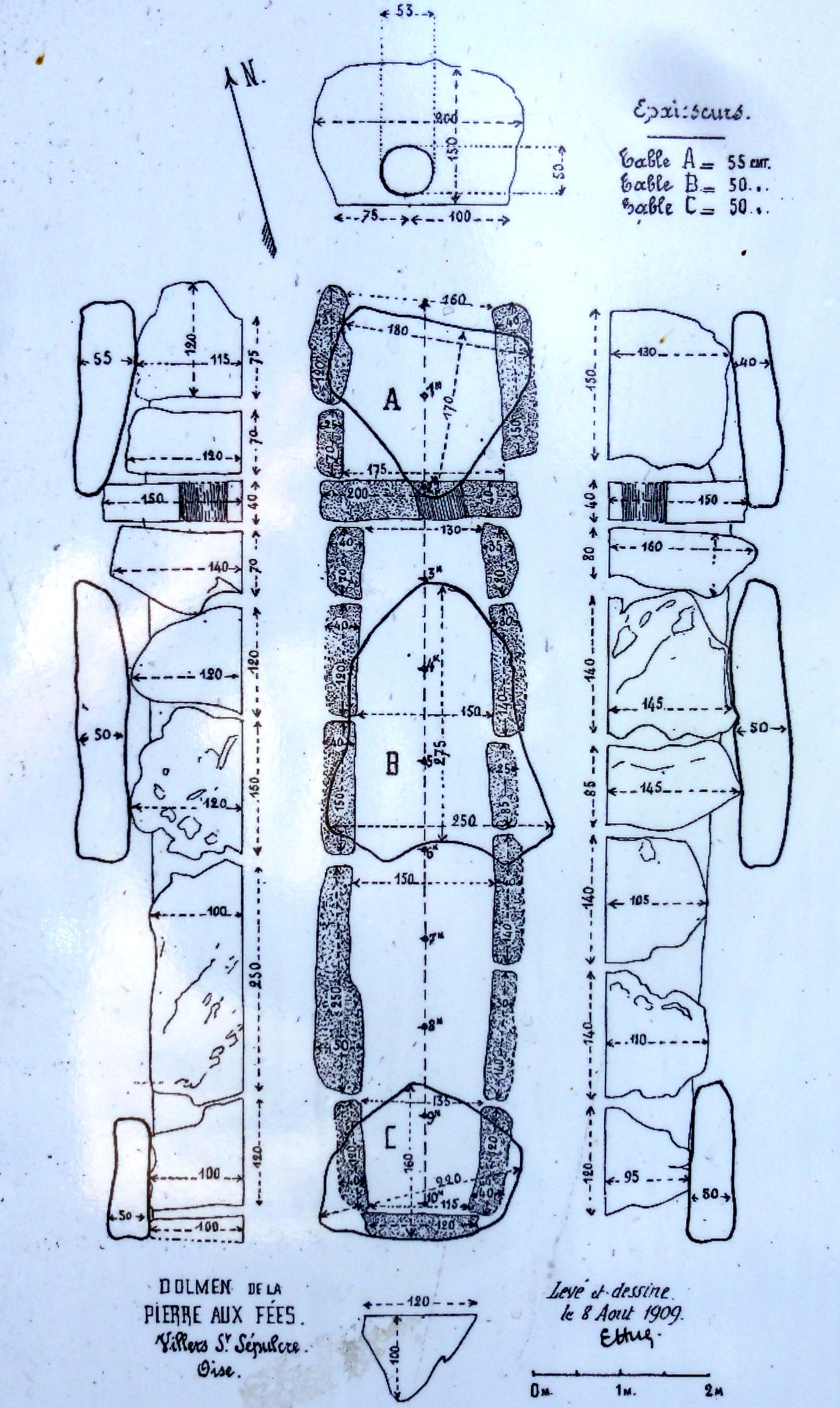 Plan de l'allée couverte relevé sur place par Emmmanuel Woillez.